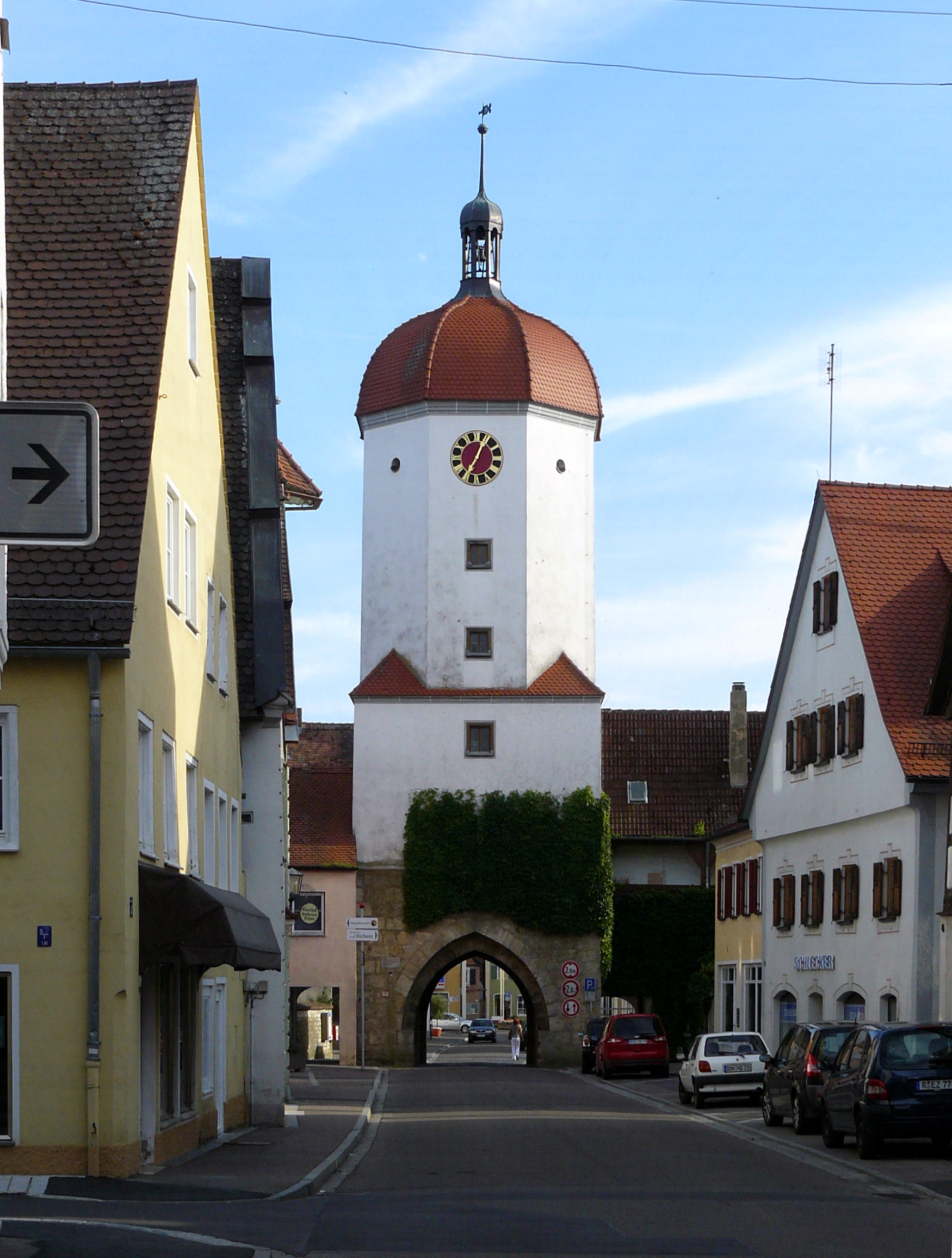 Blick auf Königsstraße und Königsturm in Oettingen in Bayern